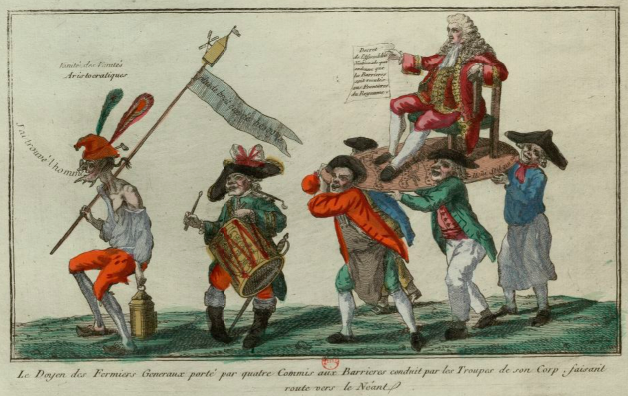 Le Doyen des fermiers généraux porté par quatre commis aux barrières conduit par les troupes de son corps faisant route vers le néant. Estampe, non identifié - Domaine Public